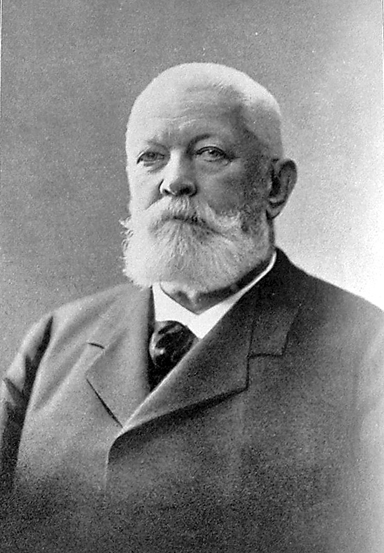 Johan Ludvig (Louis) Carl Christian Tido Holstein, lensgreve til Ledreborg, (født 10. juni 1839 i Hochberg i Württemberg, død Ledreborg 1. marts 1912). Holstein var konseilspræsident fra 16. august til 28. oktober 1909 og forsvarsminister fra 18. oktober til 28. oktober 1909. Ministeriet Holstein-Ledreborg var desuden den første mindretalsregering i Danmark.